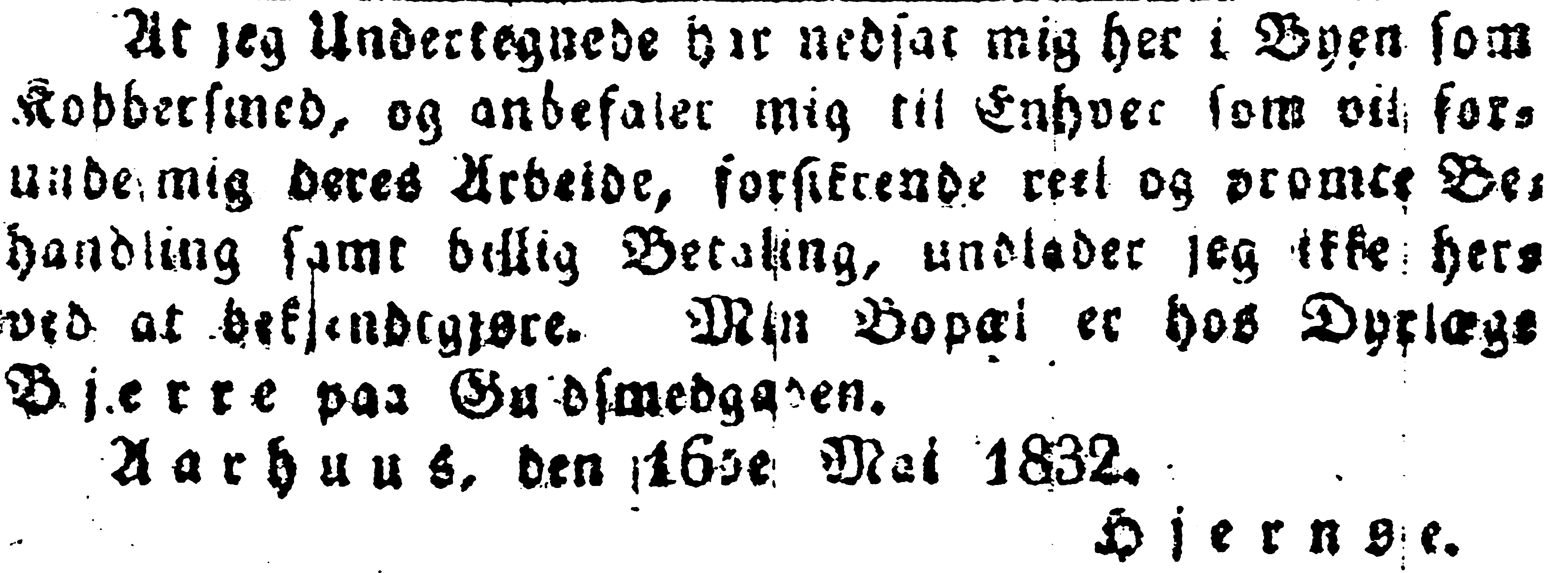 Annoncen for etableringen af VVS-firmaet Hjernø fra Aarhus Stiftstidende 16. maj 1832, skrevet af kobbersmedesvend Jens Hjernøe.